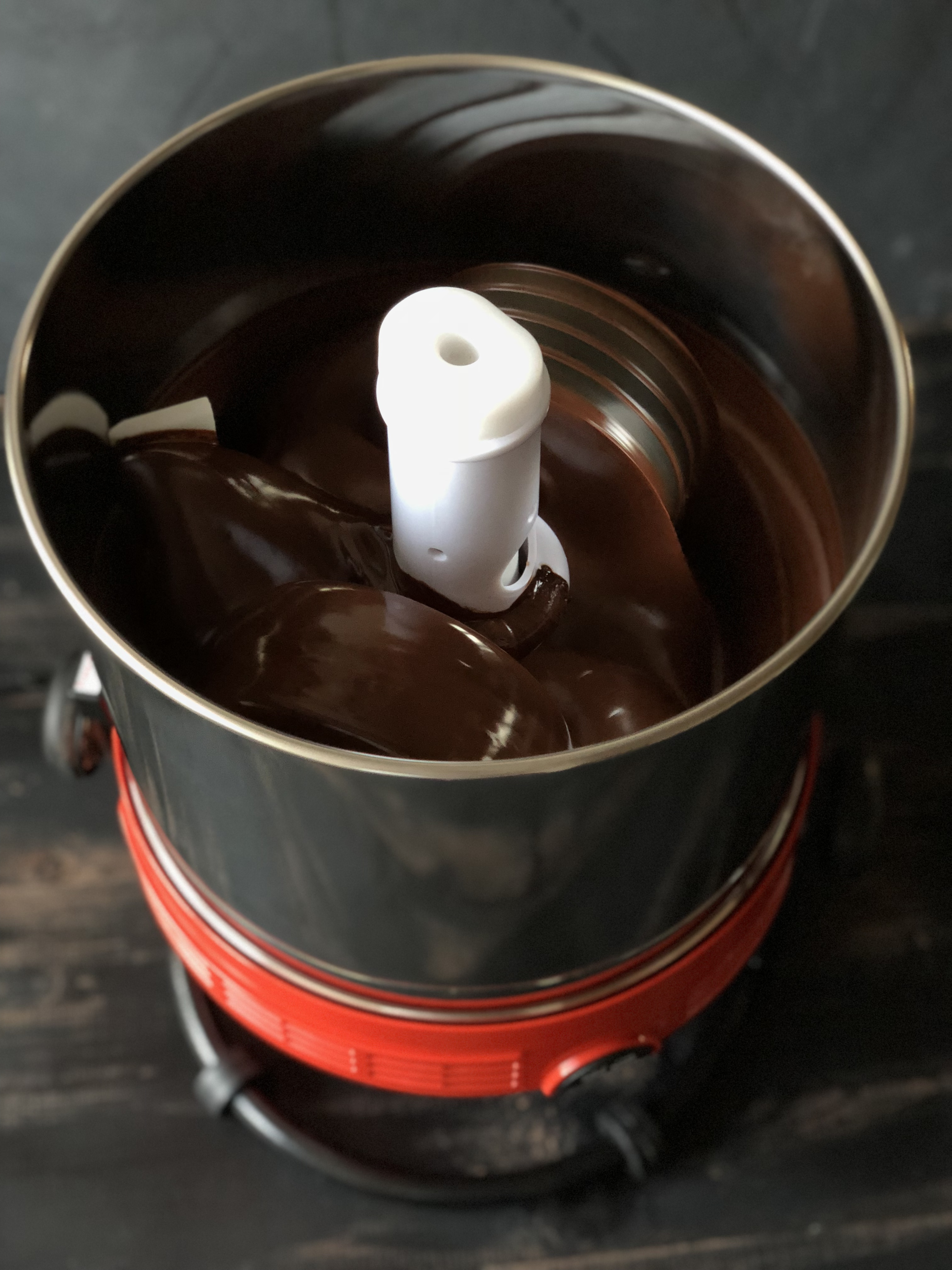 Меланжер в работе на кухне